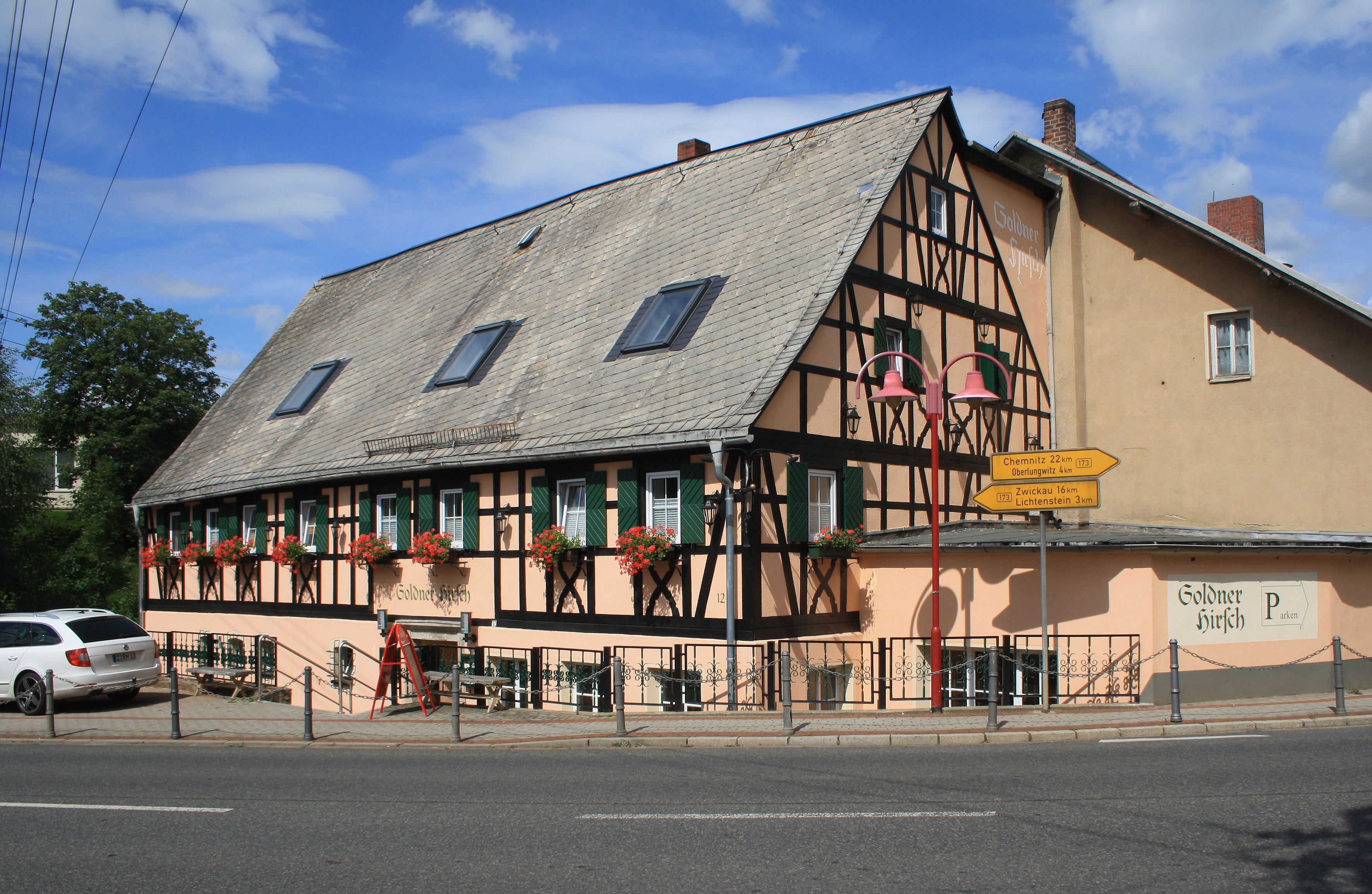 Fachwerkhaus.Dresdner Straße 12 in Bernsdorf (Landkreis Zwickau). Sachsen.Gasthof „Goldener Hirsch“ An der Kreuzung B173.